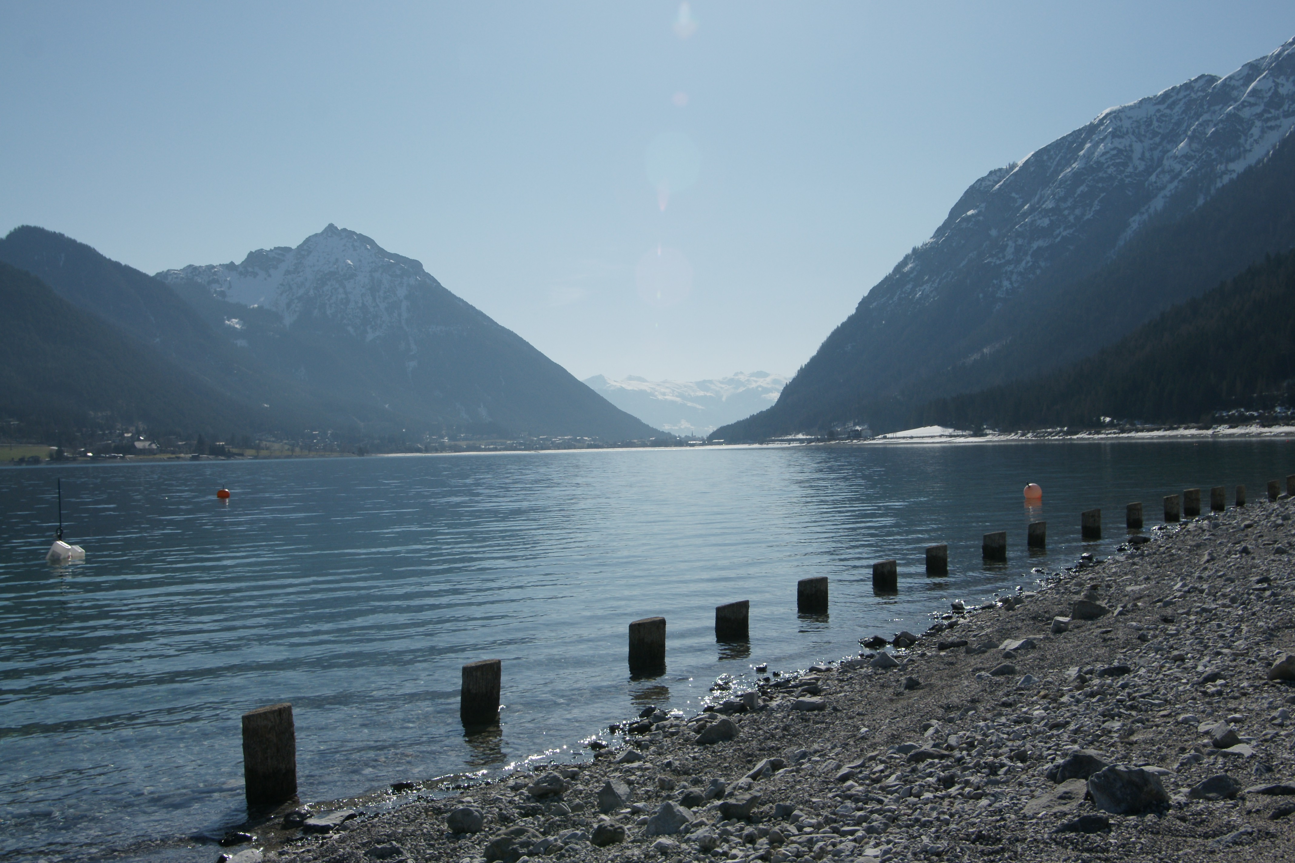 Der Achensee bei Pertisau mit Blickrichtung nach Eben .